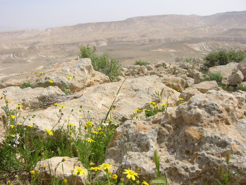 Frühling in der Negev-Wüste bei Sede Boker, Israel